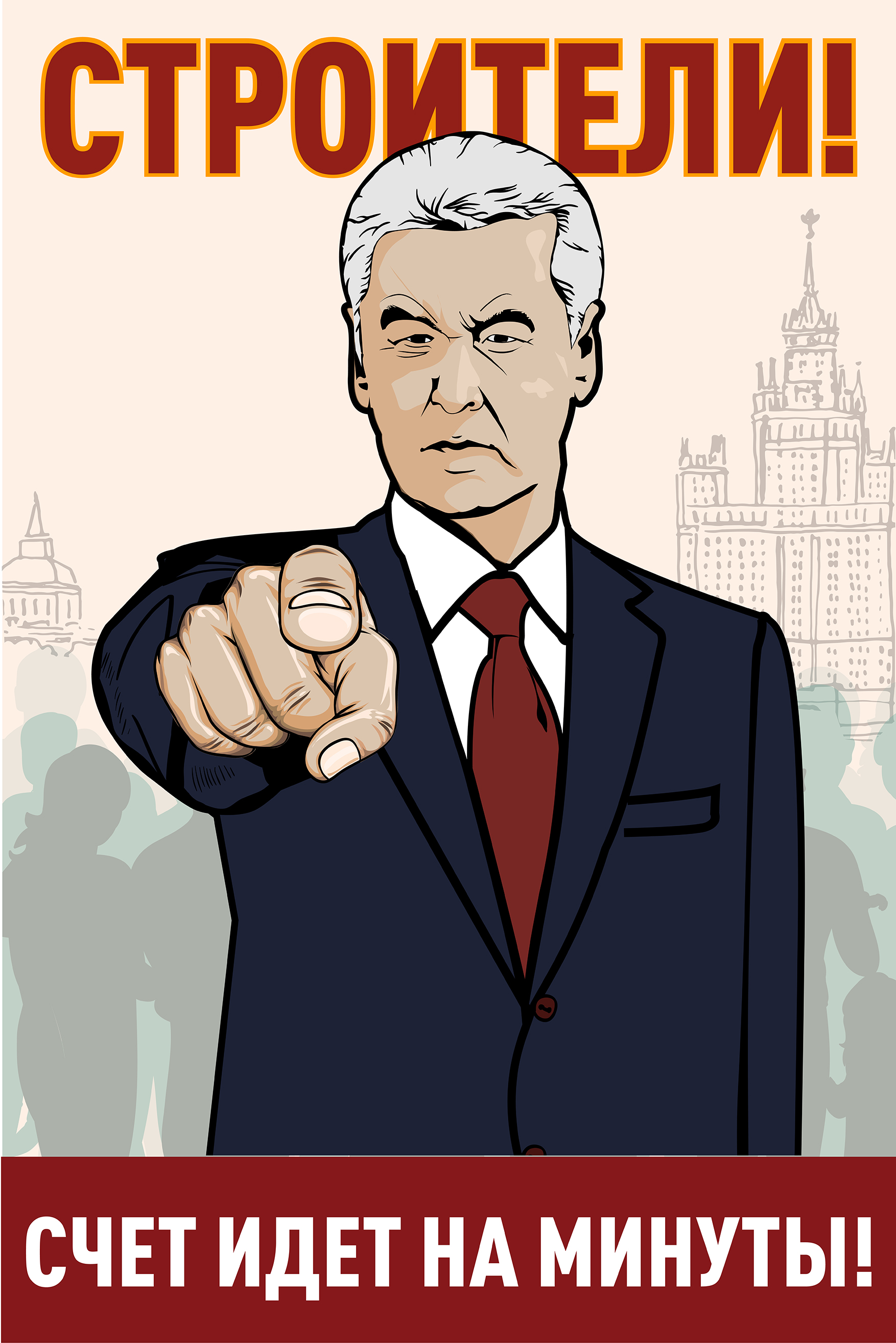 "строители! счет идет на минуты!" Плакат с изображением мэра Москвы С.С.Москвы из серии плакатов, размещенных на строительной площадке инфекционного центра в Новой Москве, и мотивирующий рабочих во время пандемии короновируса COVID-19